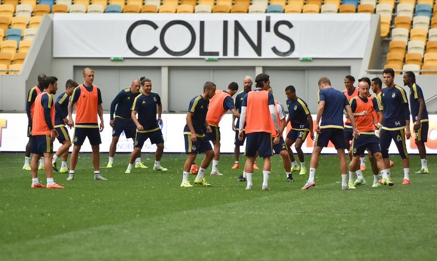 5 Ağustos 2015 tarihindeki Şahtar Donetsk karşılaşması öncesinde düzenlenen Fenerbahçe antrenmanı.